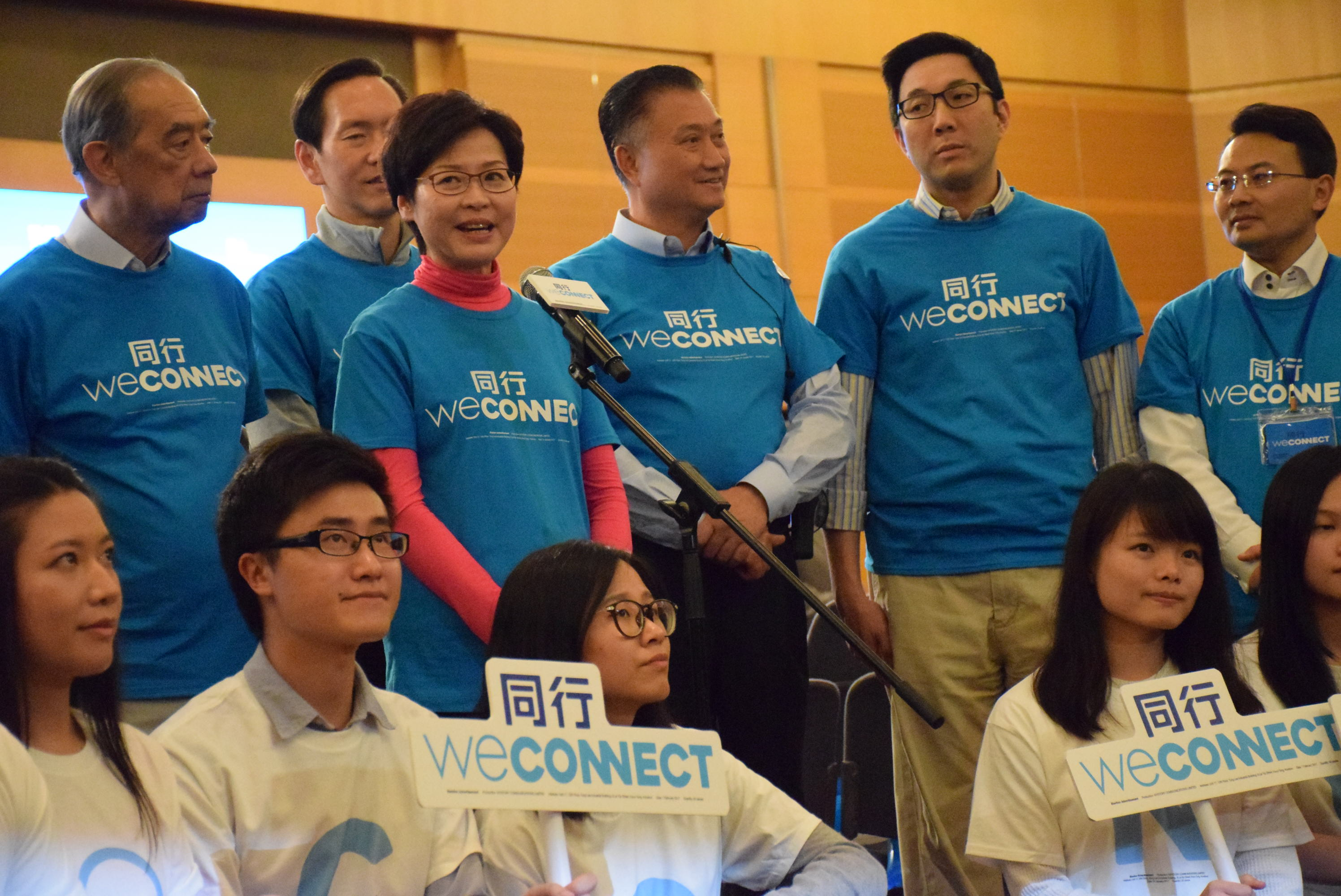 中文（香港）: 香港特首選舉參選人林鄭月娥